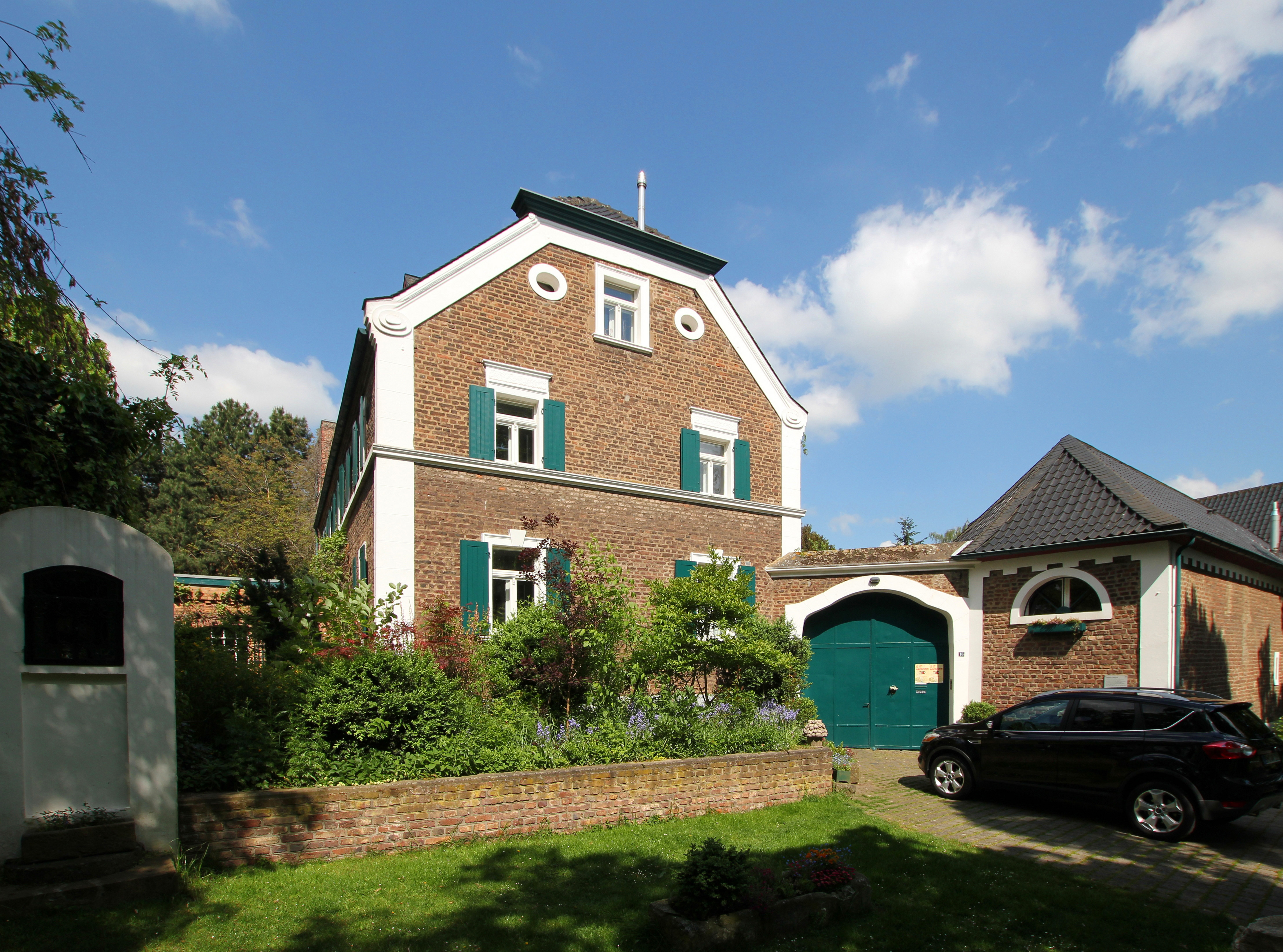 Lechenich, Auf dem Graben. Ehemalige Oebelsmühle